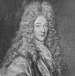 French writer Jacques de Tourreil (1656-1714)